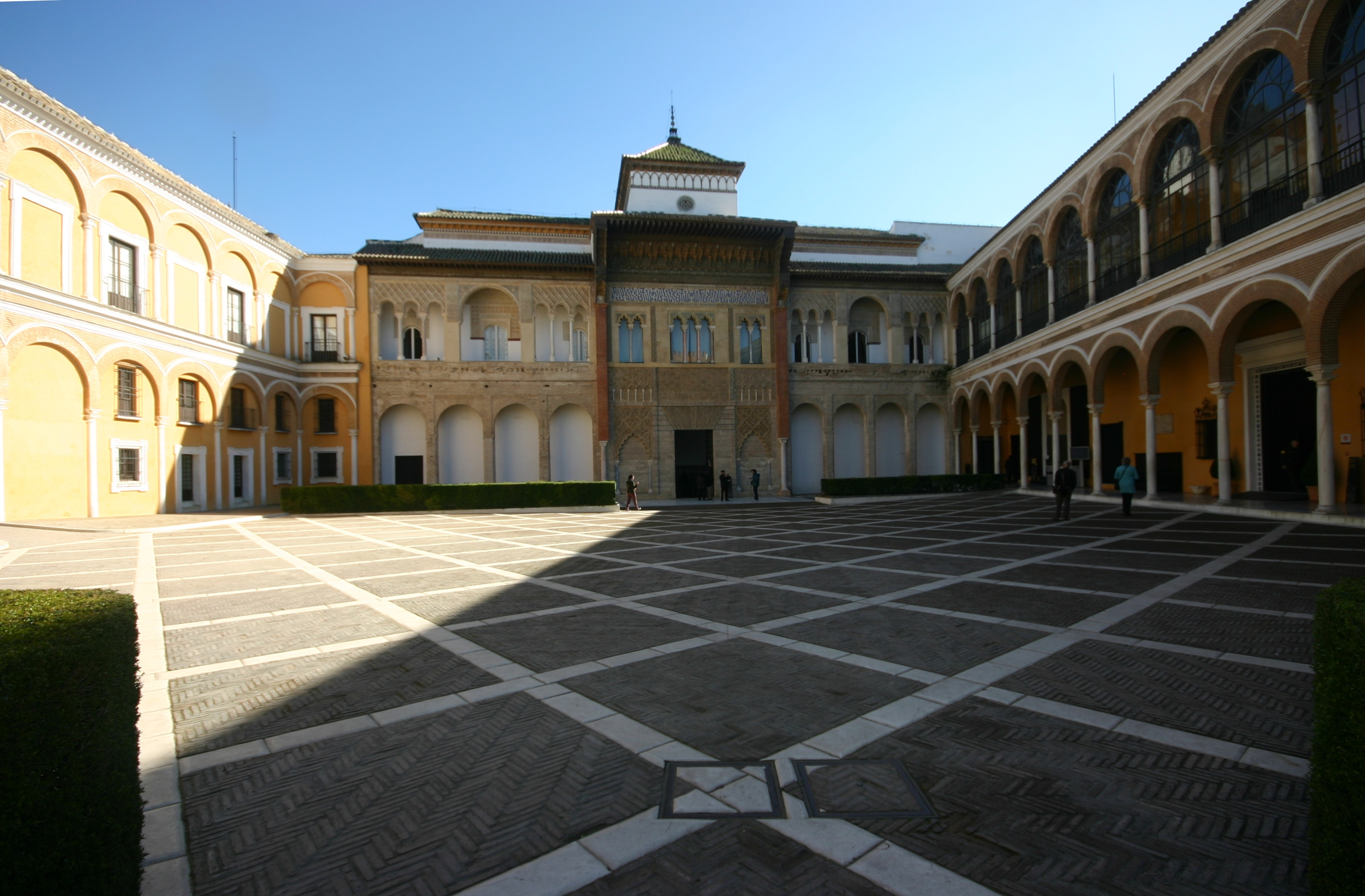 Praça da Montaria